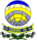 Brasão de Equador, Rio Grande do Norte, Brasil.